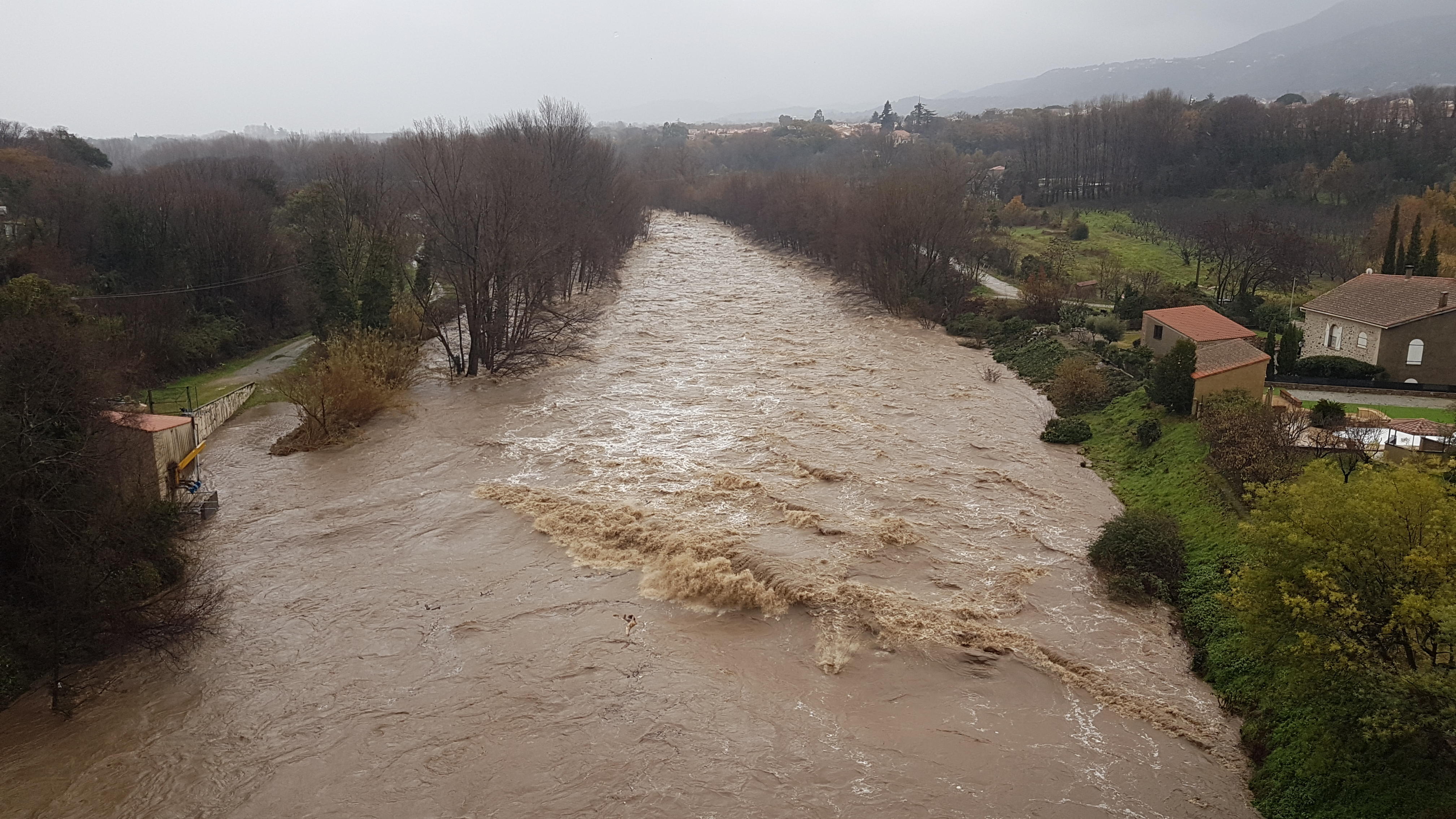 Le Tech en crue à Céret durant la tempête Gloria.